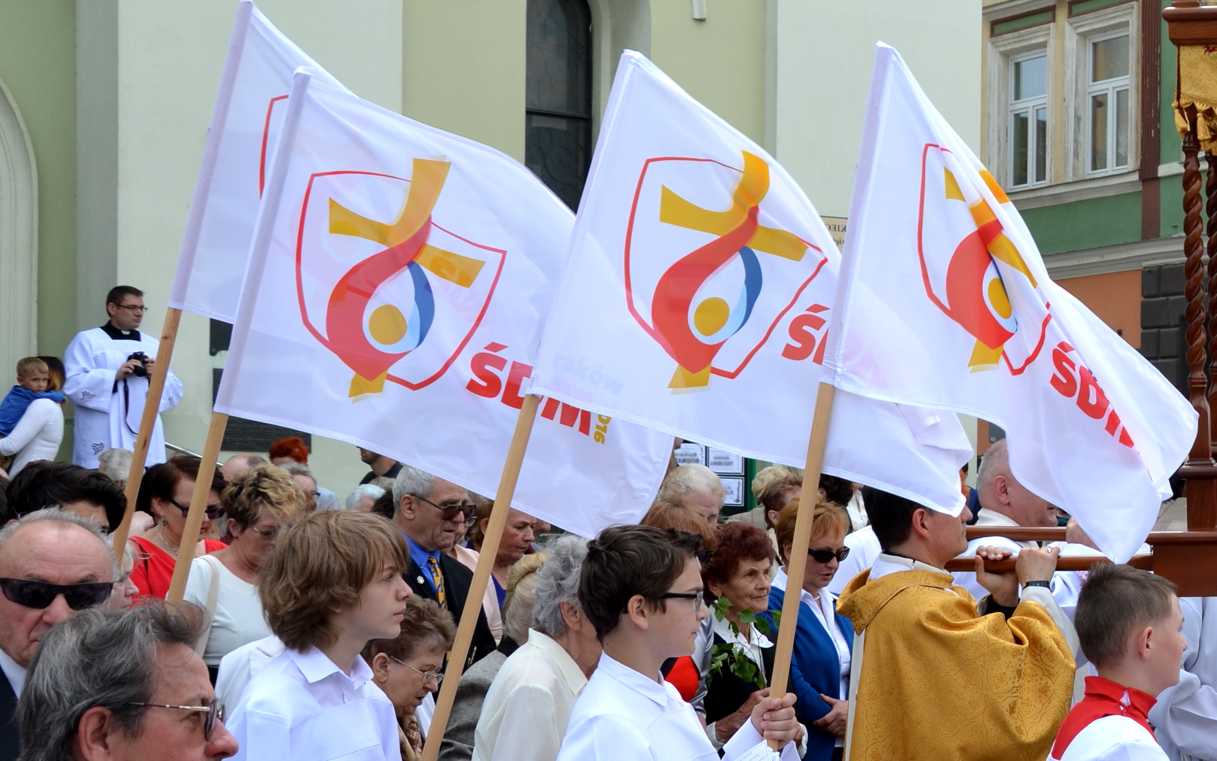 Weltjugendtag 2016